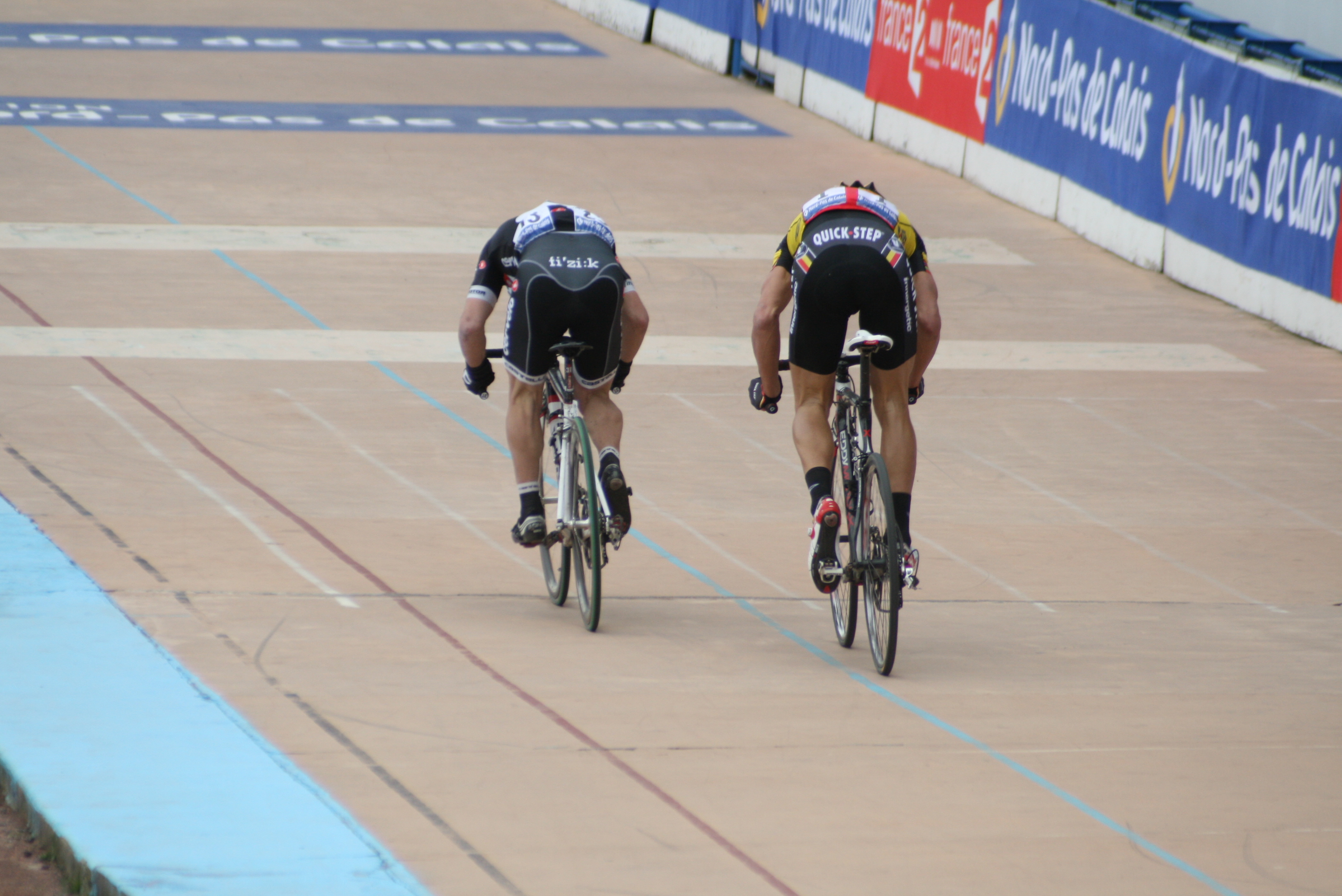 Tom Boonen et Roger Hammond à l'arrivée de Paris-Roubaix 2010